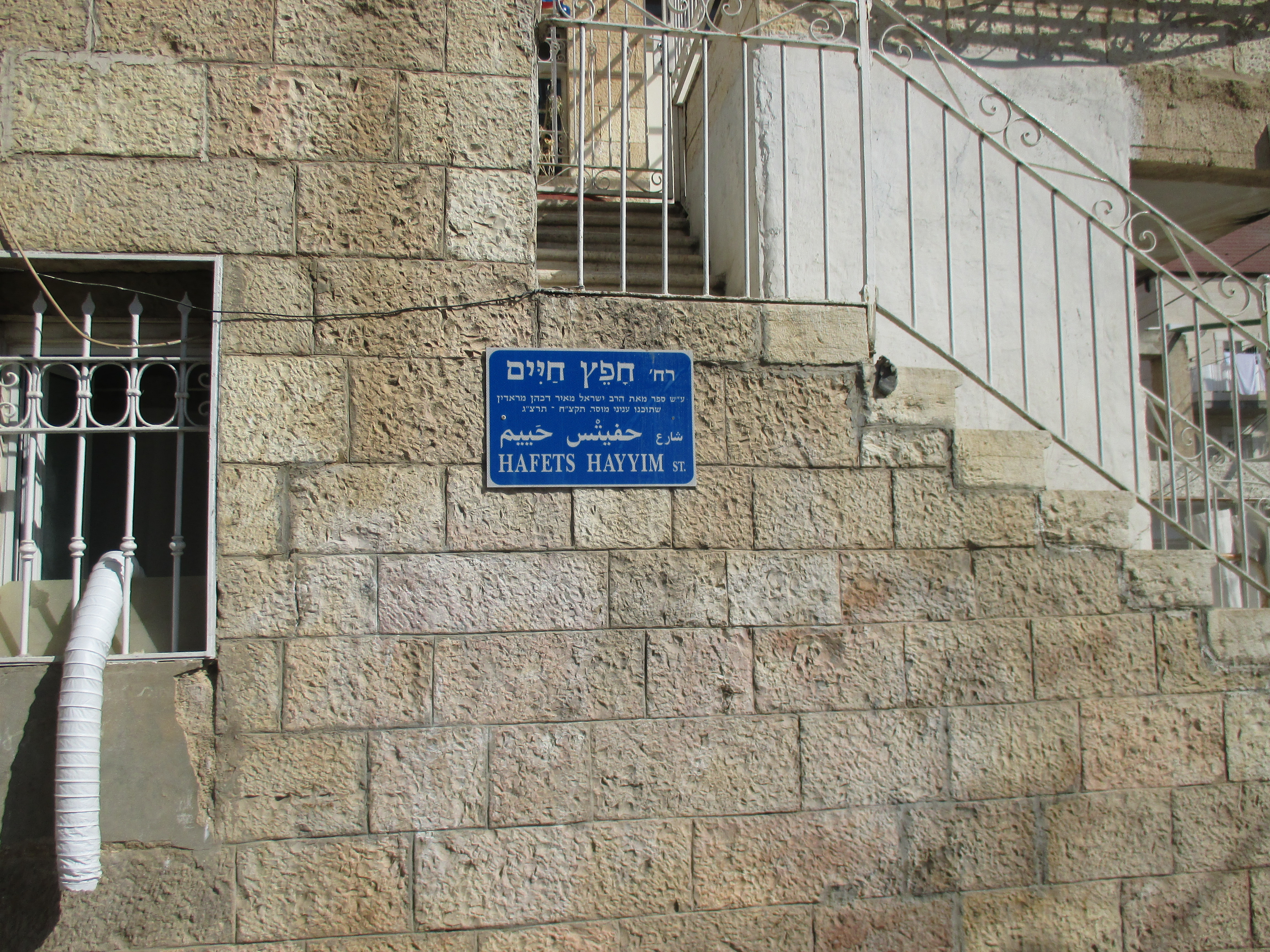 רחוב בירושלים על שם הספר חפץ חיים